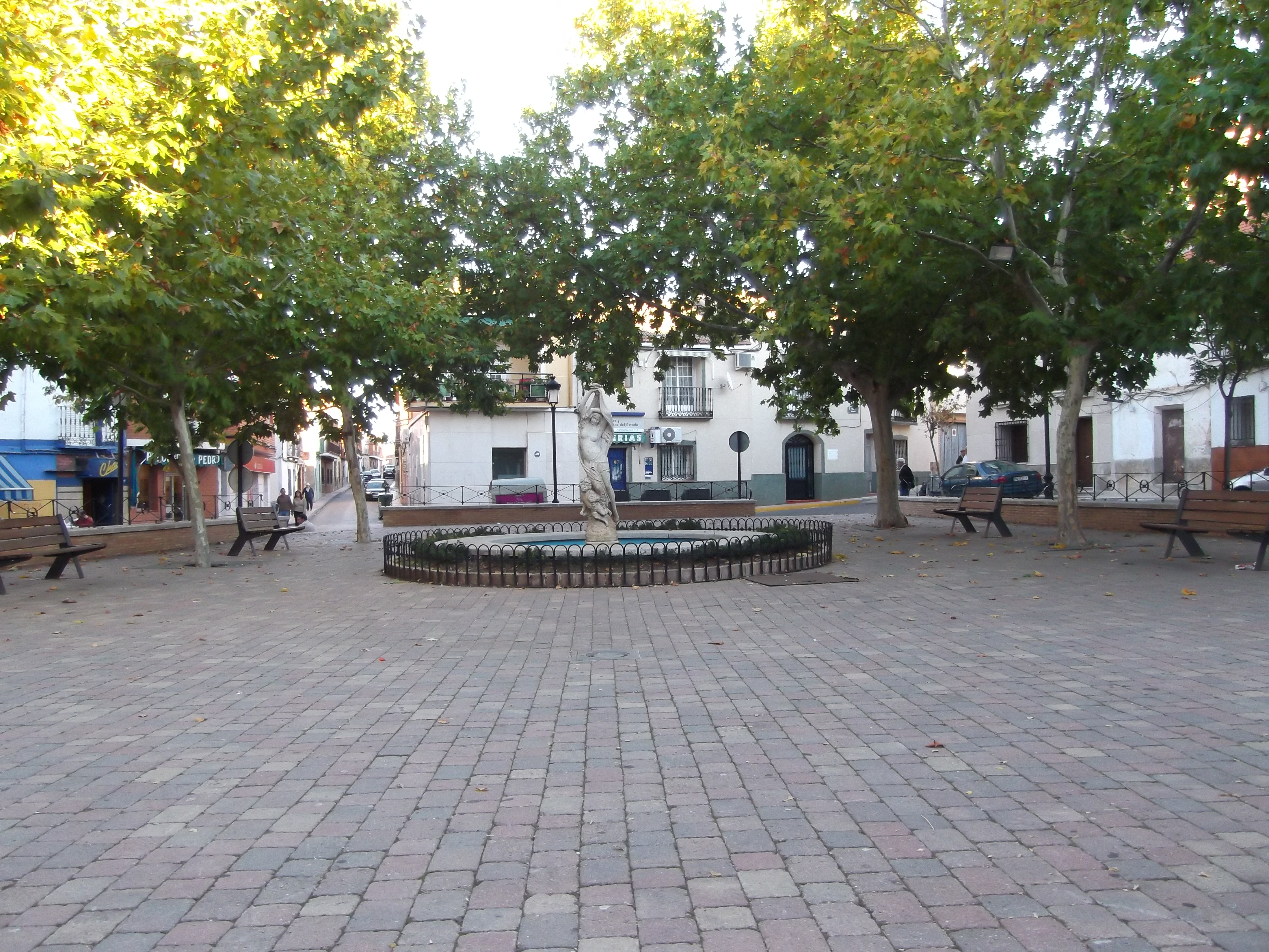 Vista de la Plaza MAyor de Porzuna tras la remodelación